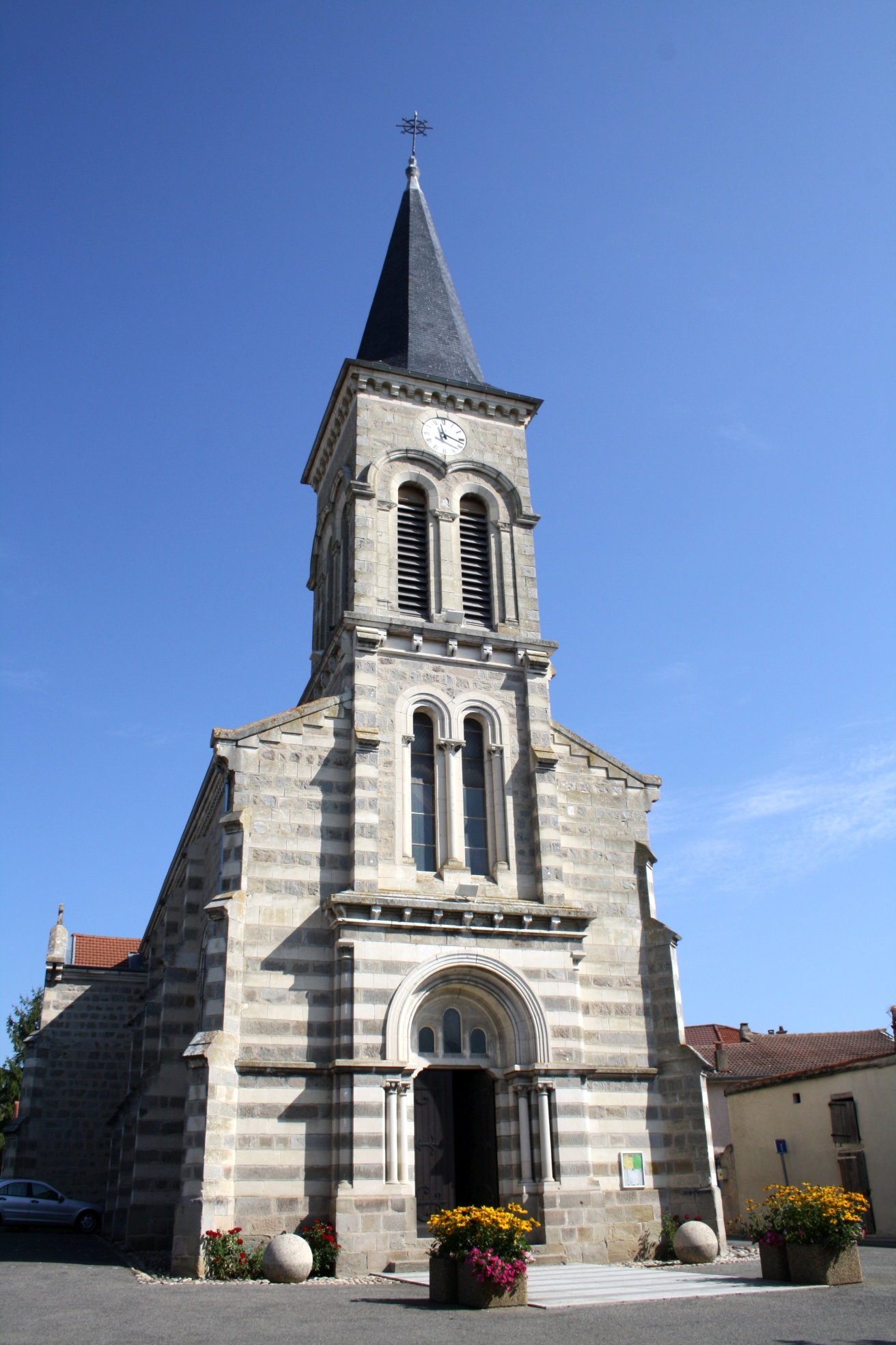 Eglise Saint-Ennemond à Chalain-le-Comtal (Loire)